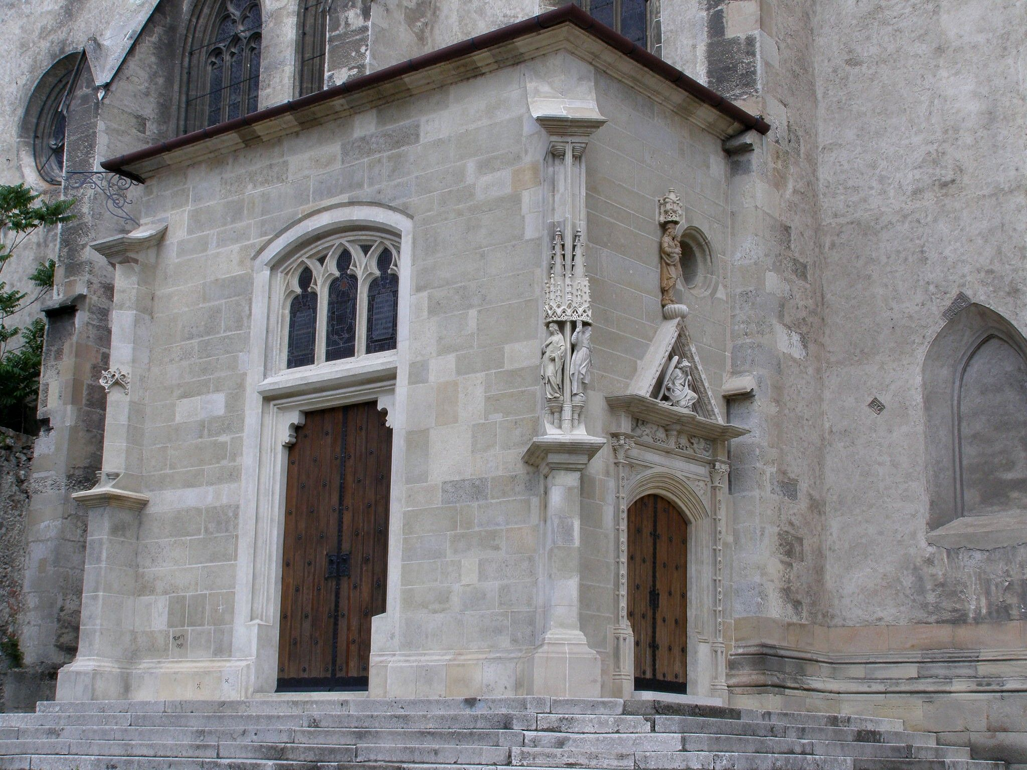 Katedrála sv. Martina, južná predsieň